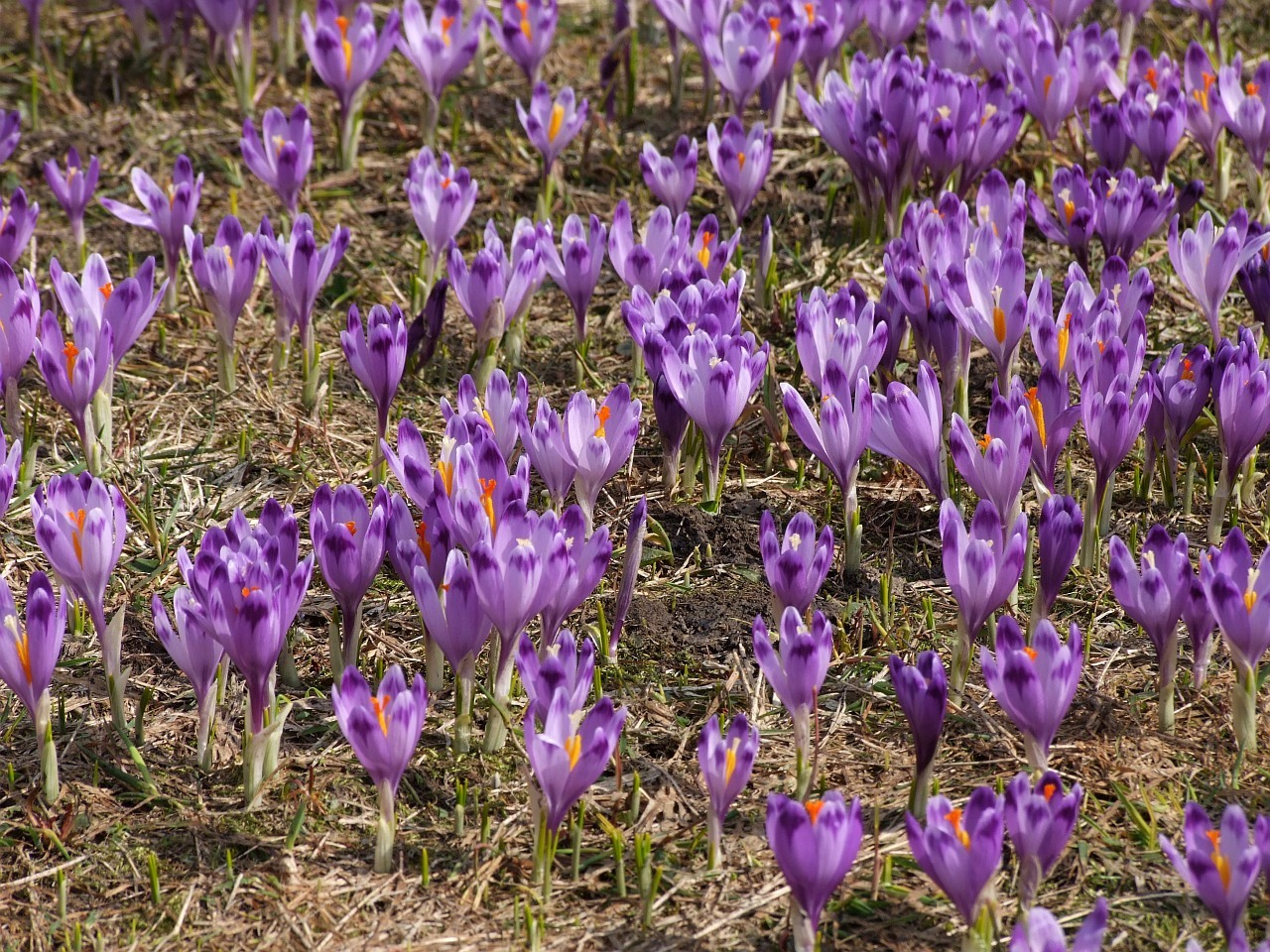 Crocus vernus (syn. C. scepusiensis); habitat: Gorce, przysiółek Rzeki w Lubomierzu, Poland.